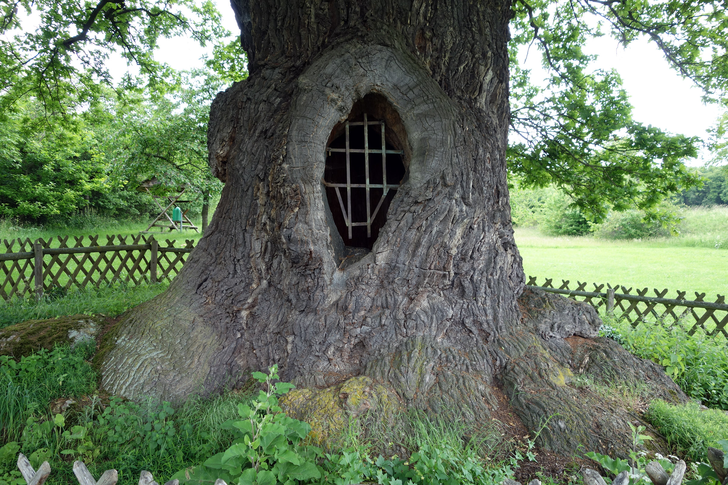 Königseiche Volkenroda